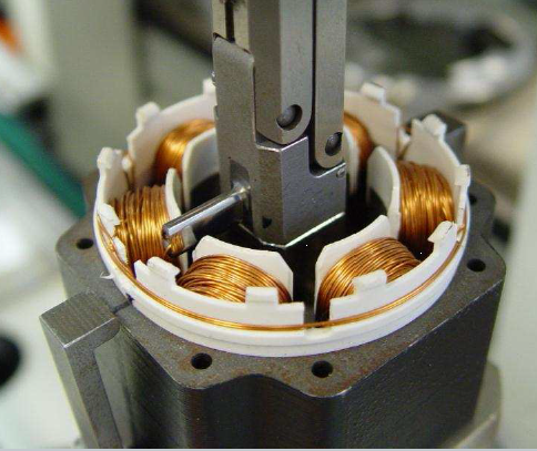 Nadelwickeltechnik mit Darstellung der Verschaltungsdrähte an der Endscheibe